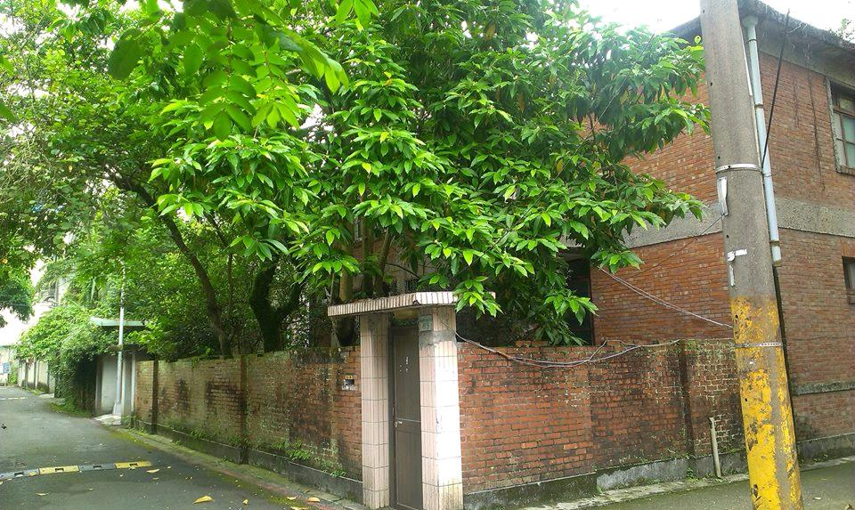 化南新村張奶奶的家門口。